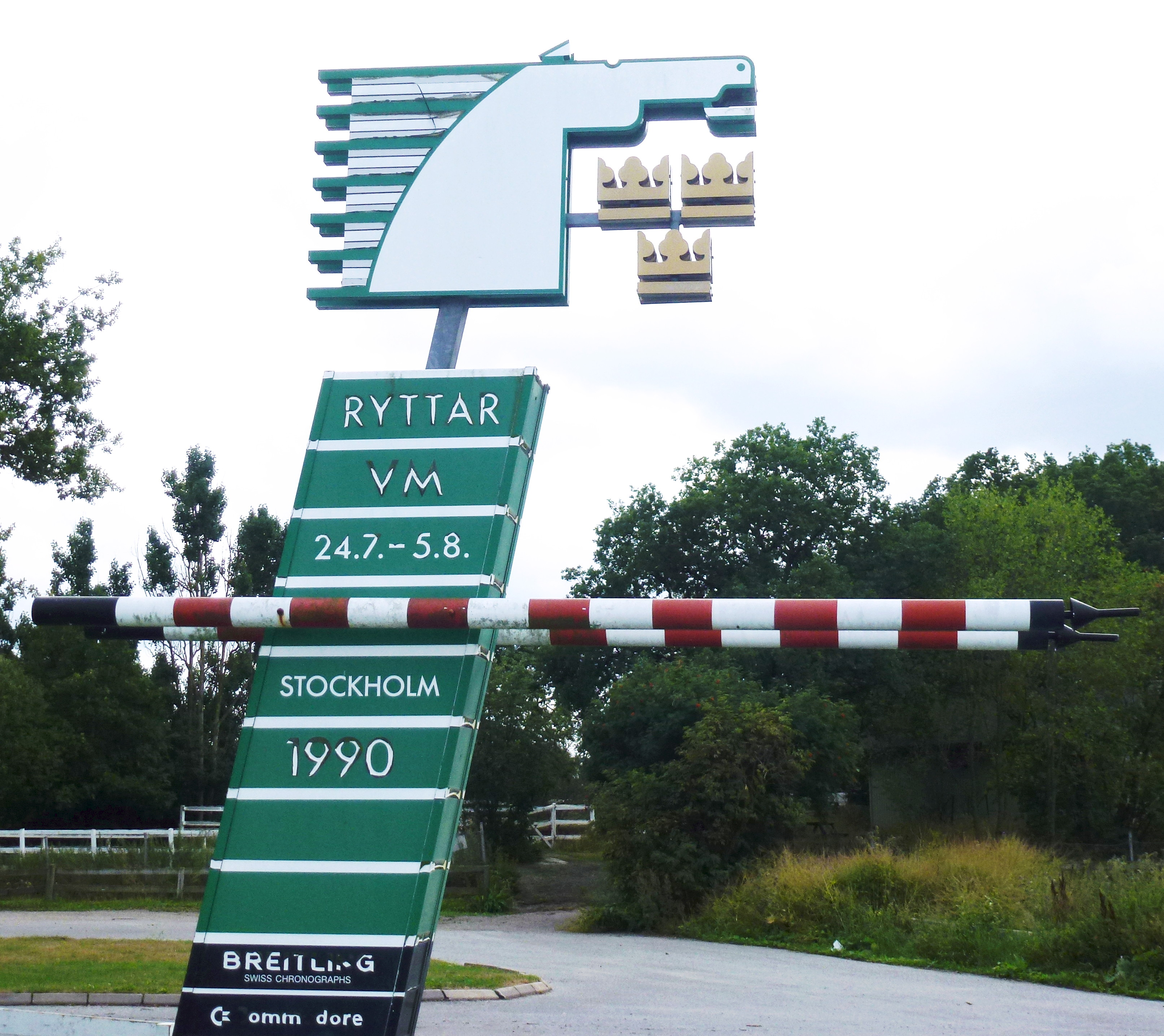 Reklammast för Ryttar VM 1990